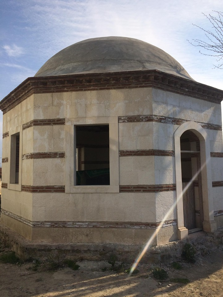 Konuralp Bey Türbesi siyasi rant uğruna kapı ve pencereleri aylardır takılmamıştır.